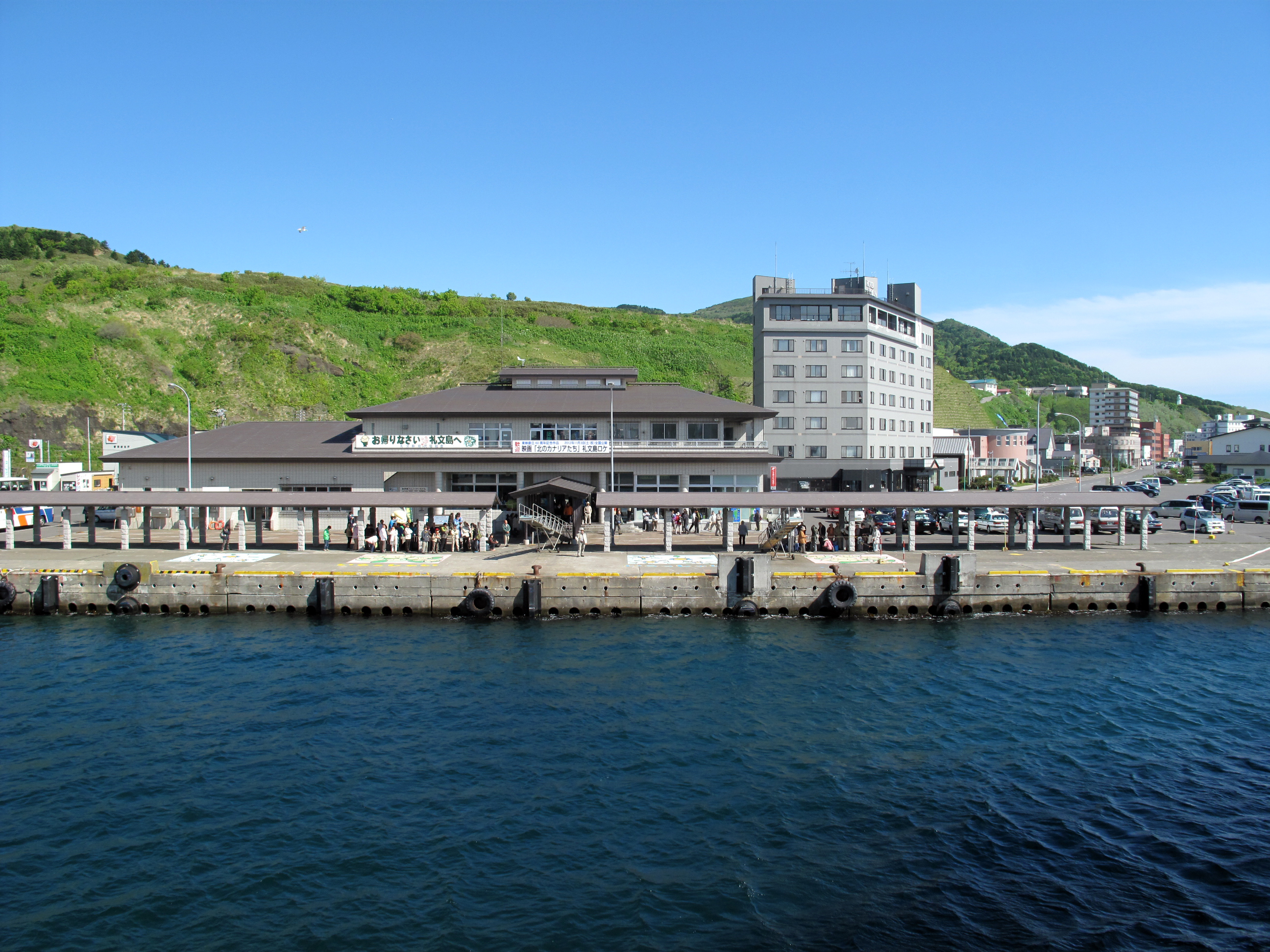 礼文島香深港